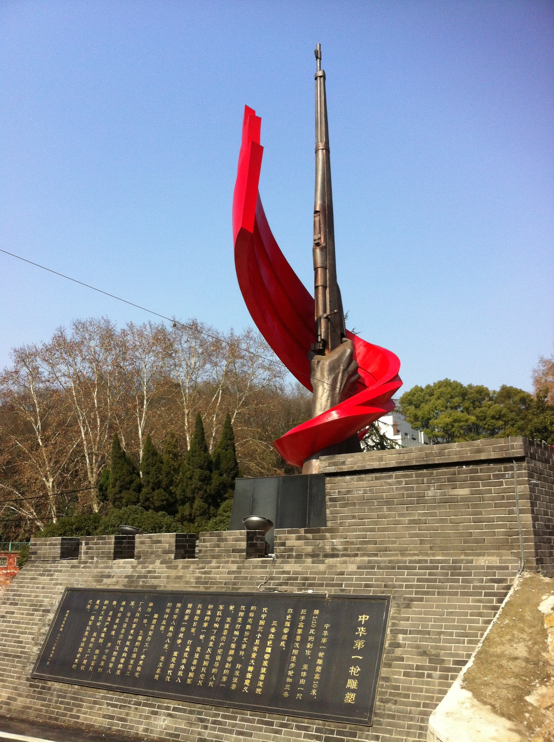 中文（中国大陆）: 中华第一枪雕塑